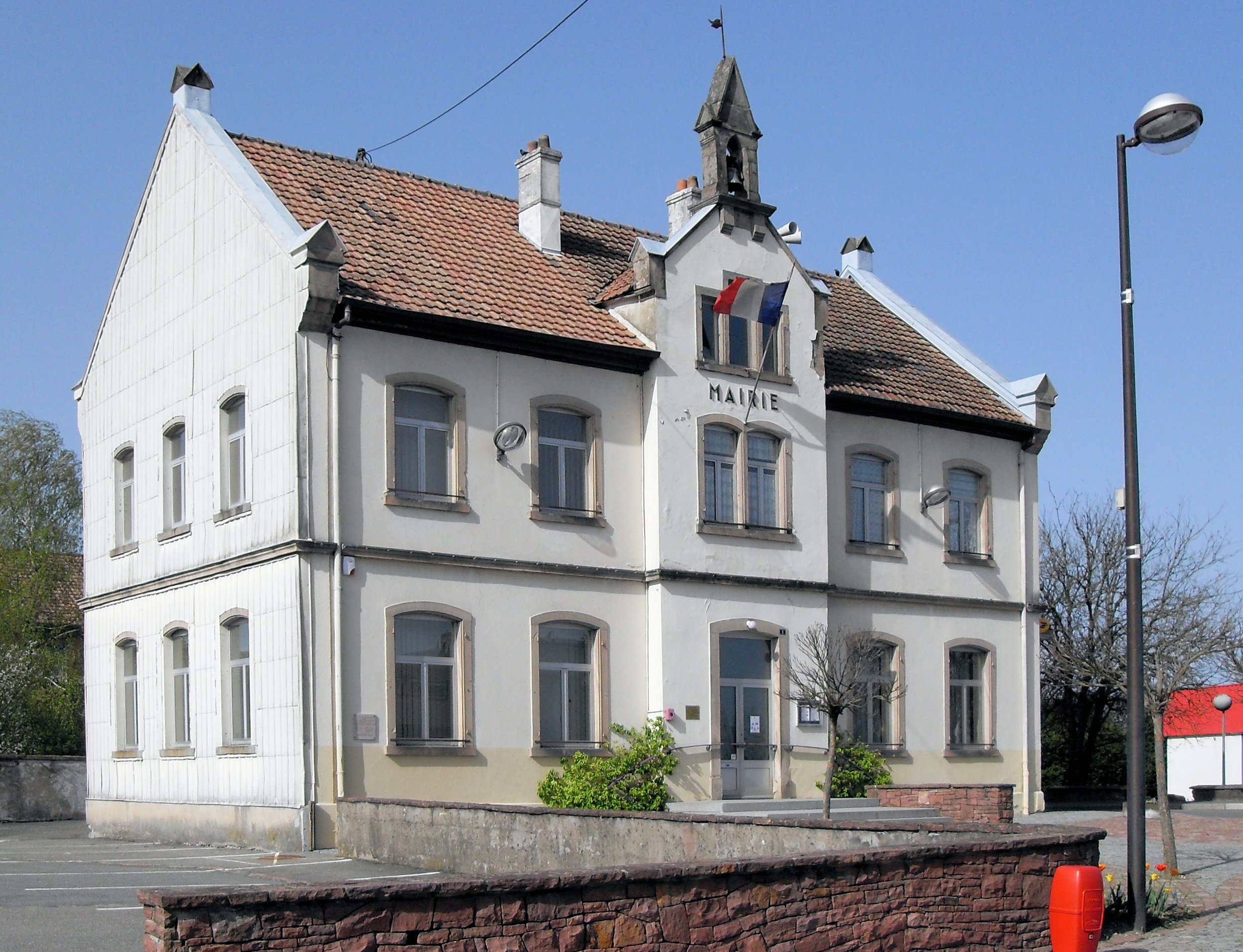 La mairie de Montreux-Vieux